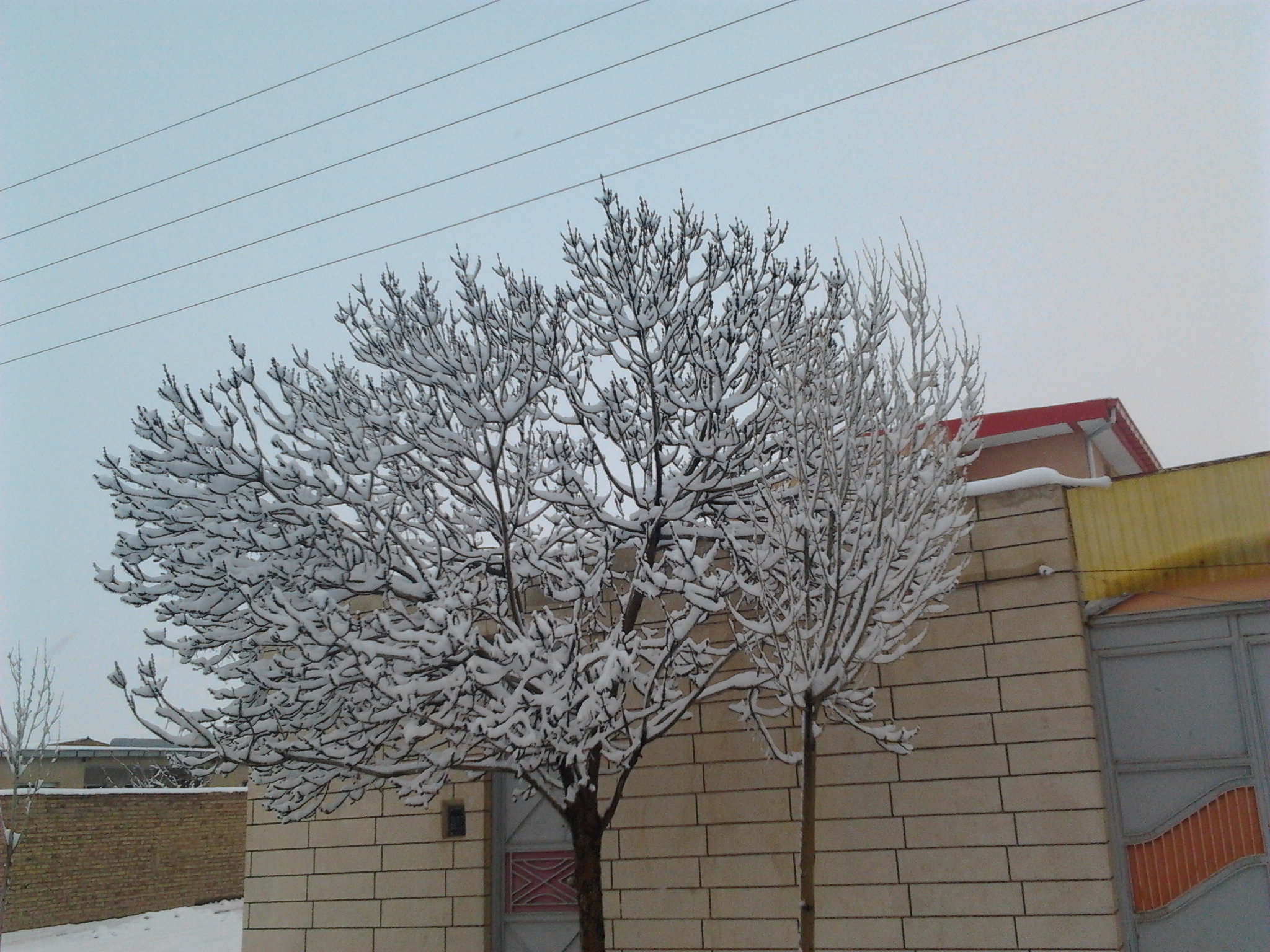 تاریخ : 2014-03-13